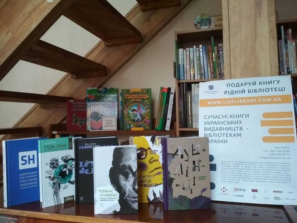 Подаровані бібліотеці книги